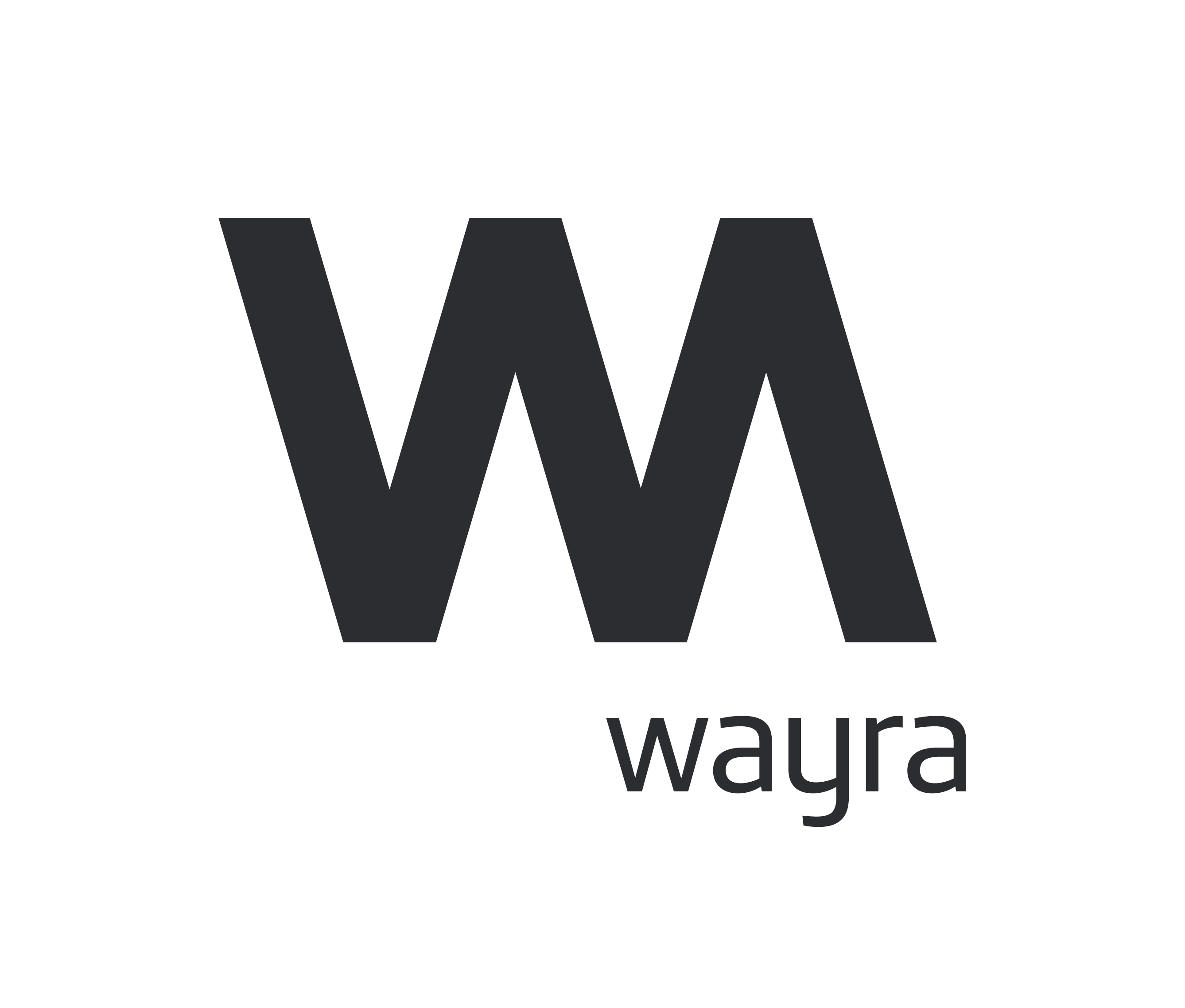 Wayra, el hub de Innovación Abierta más global, conectado y tecnológico del mundo